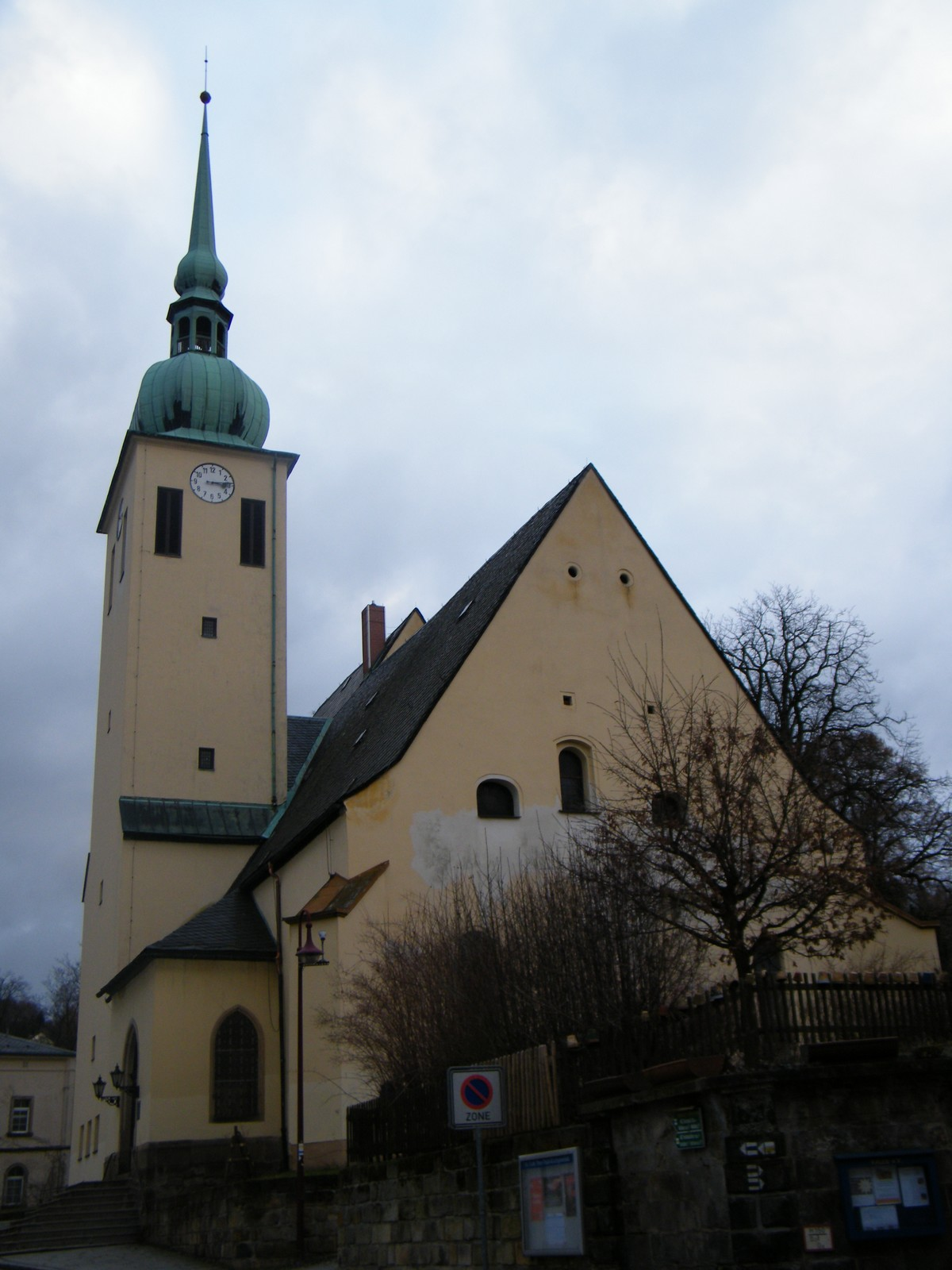 Peter-Pauls-Kirche in Sebnitz